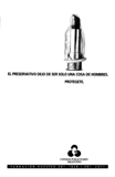 La campaña apuntó a concientizar a las mujeres sobre el uso del preservativo.